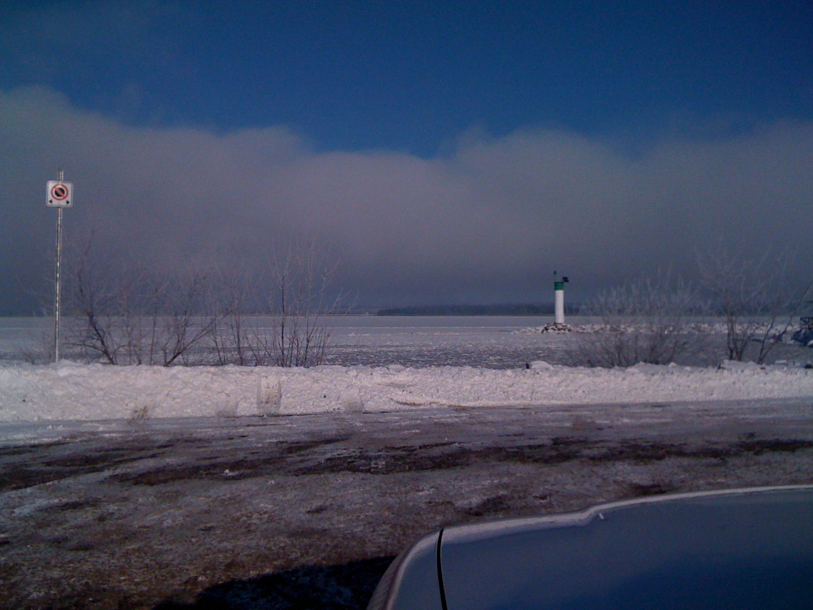 Pembroke Marina (Dec, 18, 09)